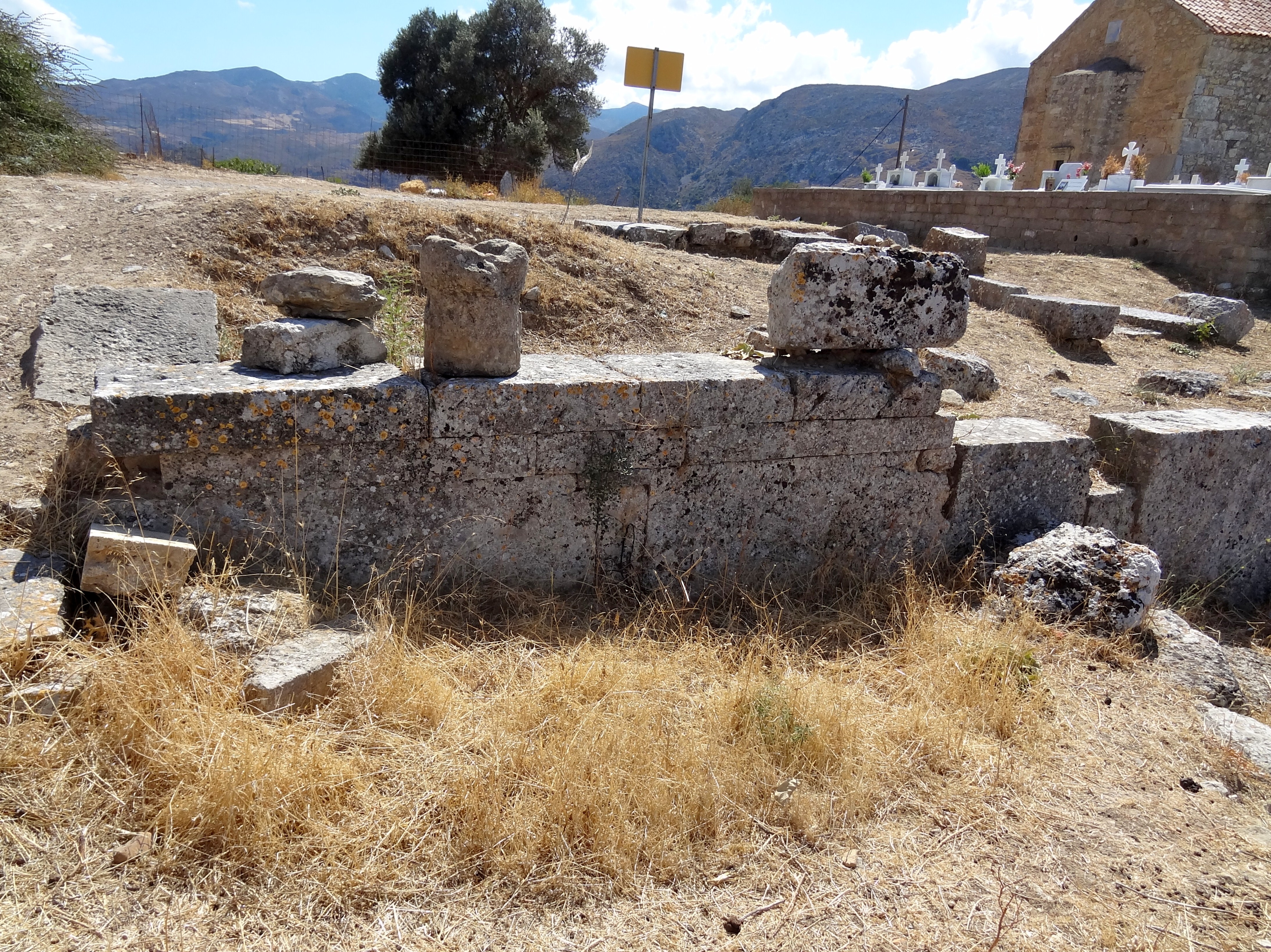 Reste des antiken Heiligtums (Ιερό) oder Telesterions (Τελεστήριον) von Polyrrhenia (Πολυρρηνία), Gemeinde Kissamos, Regionalbezirk Chania, Kreta, Griechenland